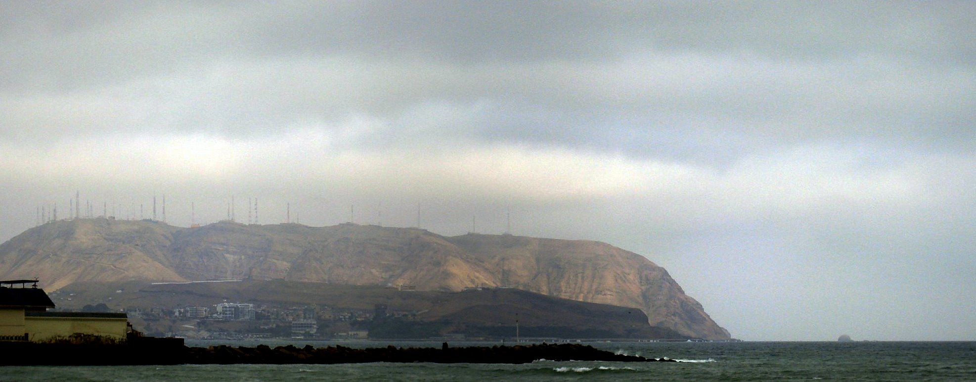 Morro Solar. Lima, Peru.